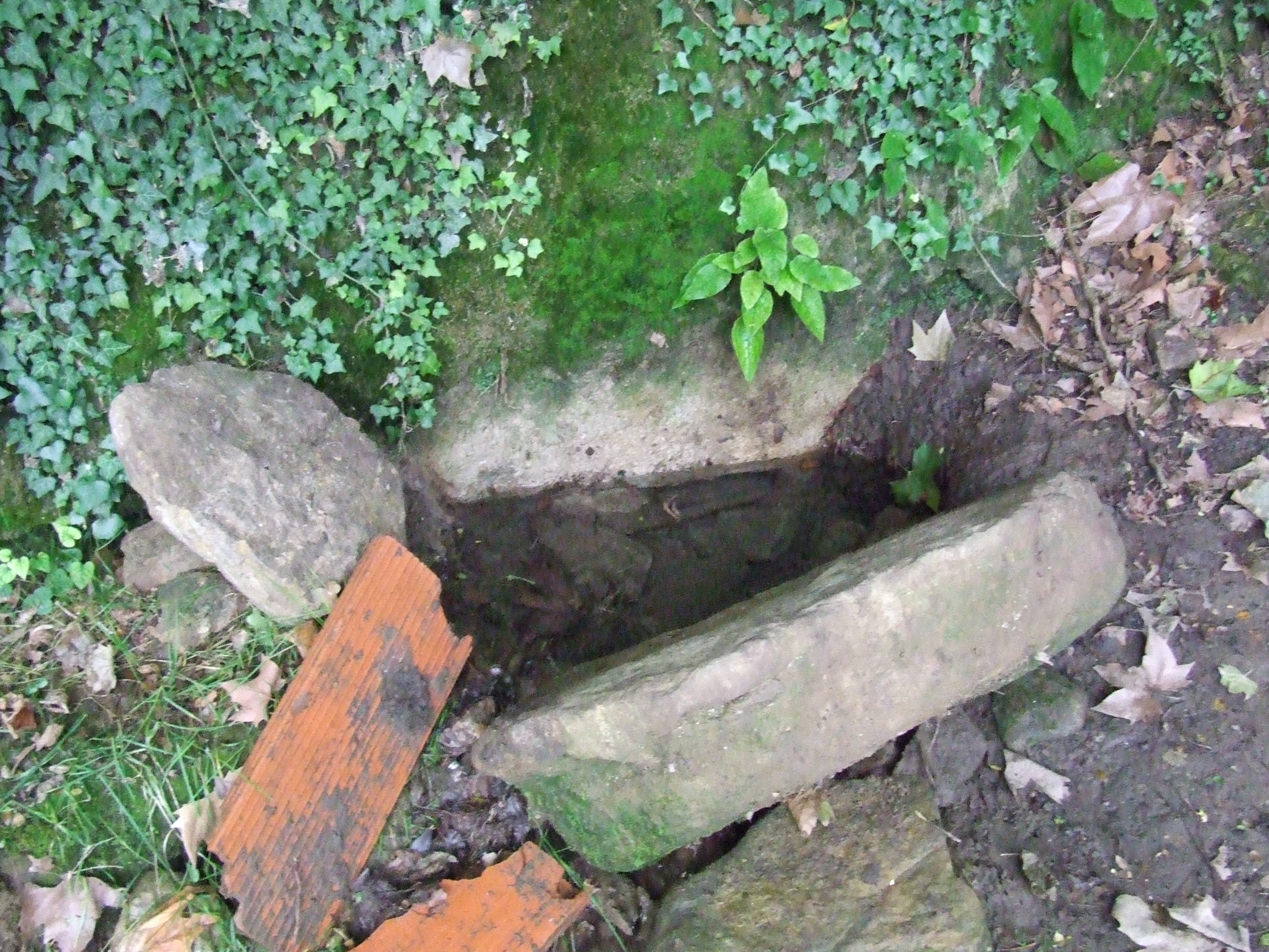 La Font del Molí Vell (Castellcir, Moianès)